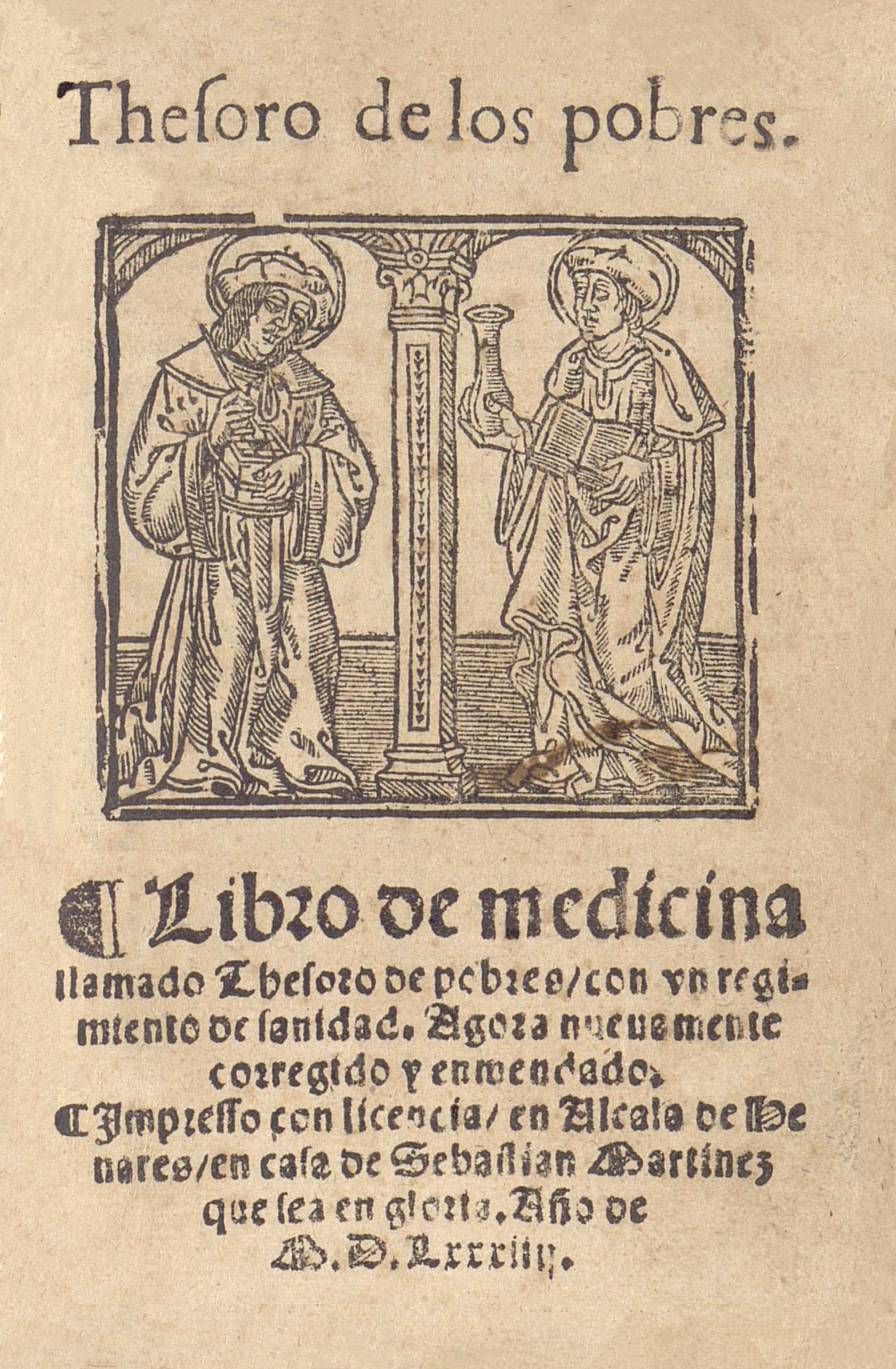 Portada del "Libro de medicina llamado thesoro de pobres con un regimiento de sanidad" de Arnau de Vilanova. Edición en español de "Regimen sanitatis", publicada en Alcalá de Henares por la viuda de Sebastián Martínez en 1584.